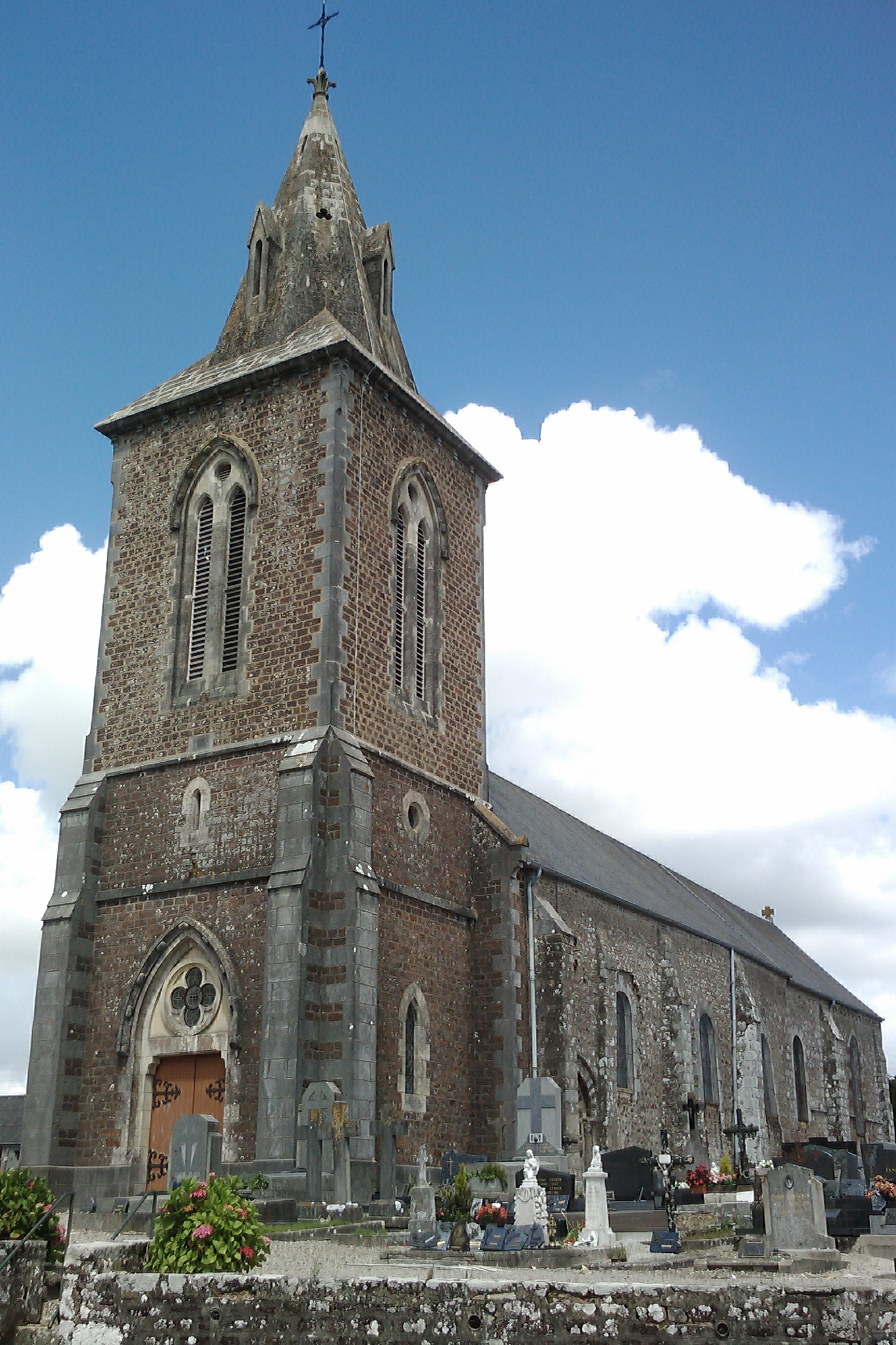 Église Saint-Ouen de Lengronne